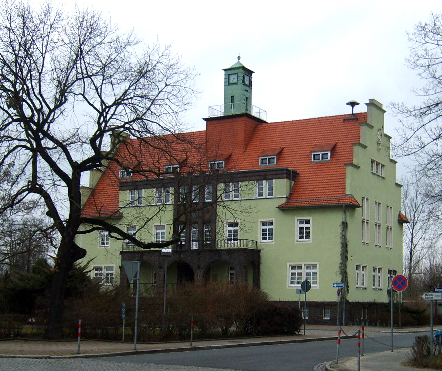 Rathaus in Gröditz